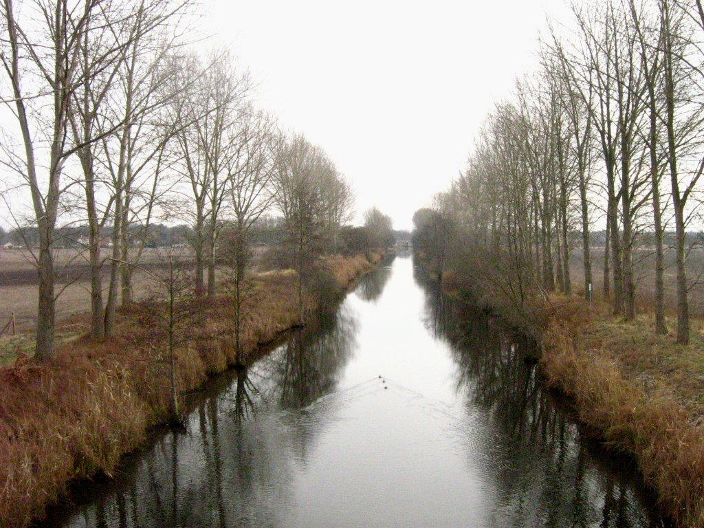 Der Ruppiner Kanal von der neuen Bundesstraße B 96n bei Oranienburg aus gesehen, Blickrichtung nach Osten (Landkreis Oberhavel, Brandenburg) 52°46′32″N 13°13′10″E / 52.77556°N 13.21944°E